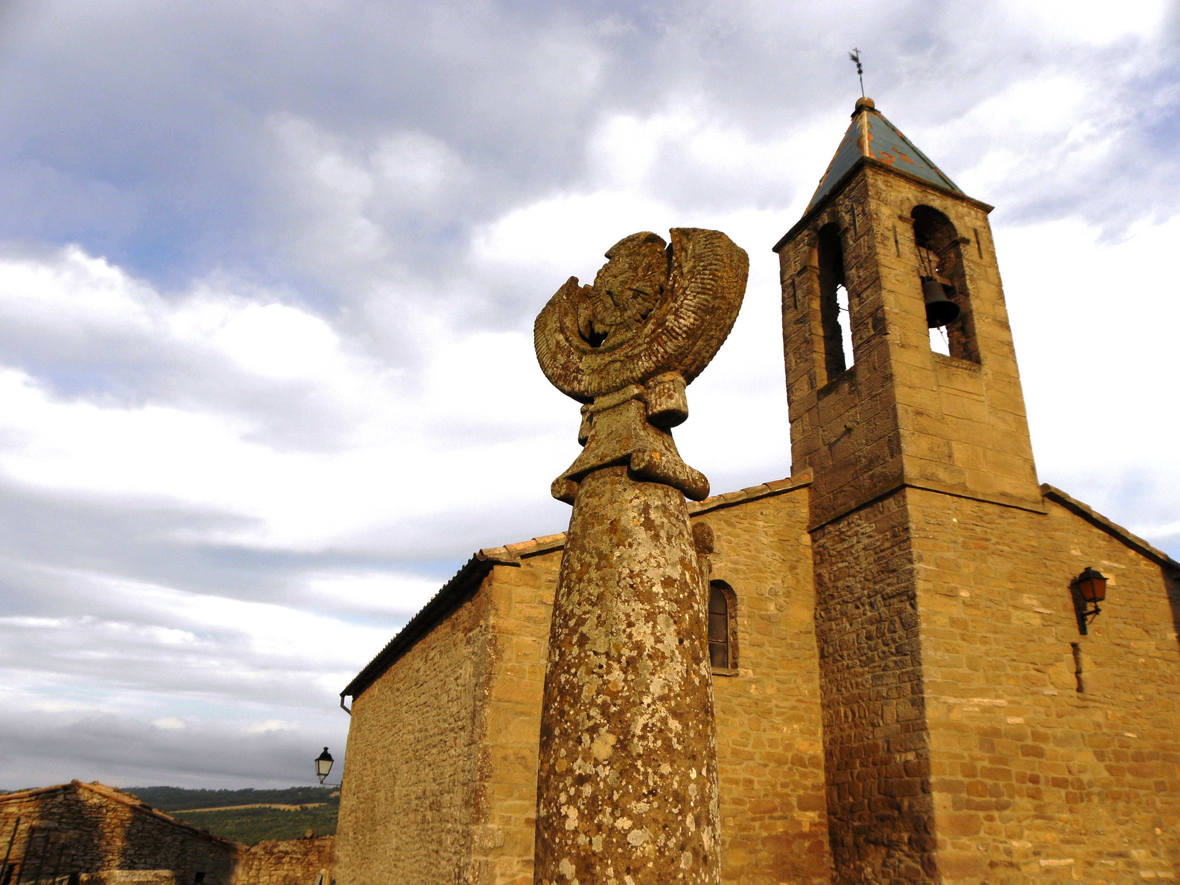 El campanar de l'església de Sant Ponç, a Prades de la Molsosa (La Molsosa, Solsonès)